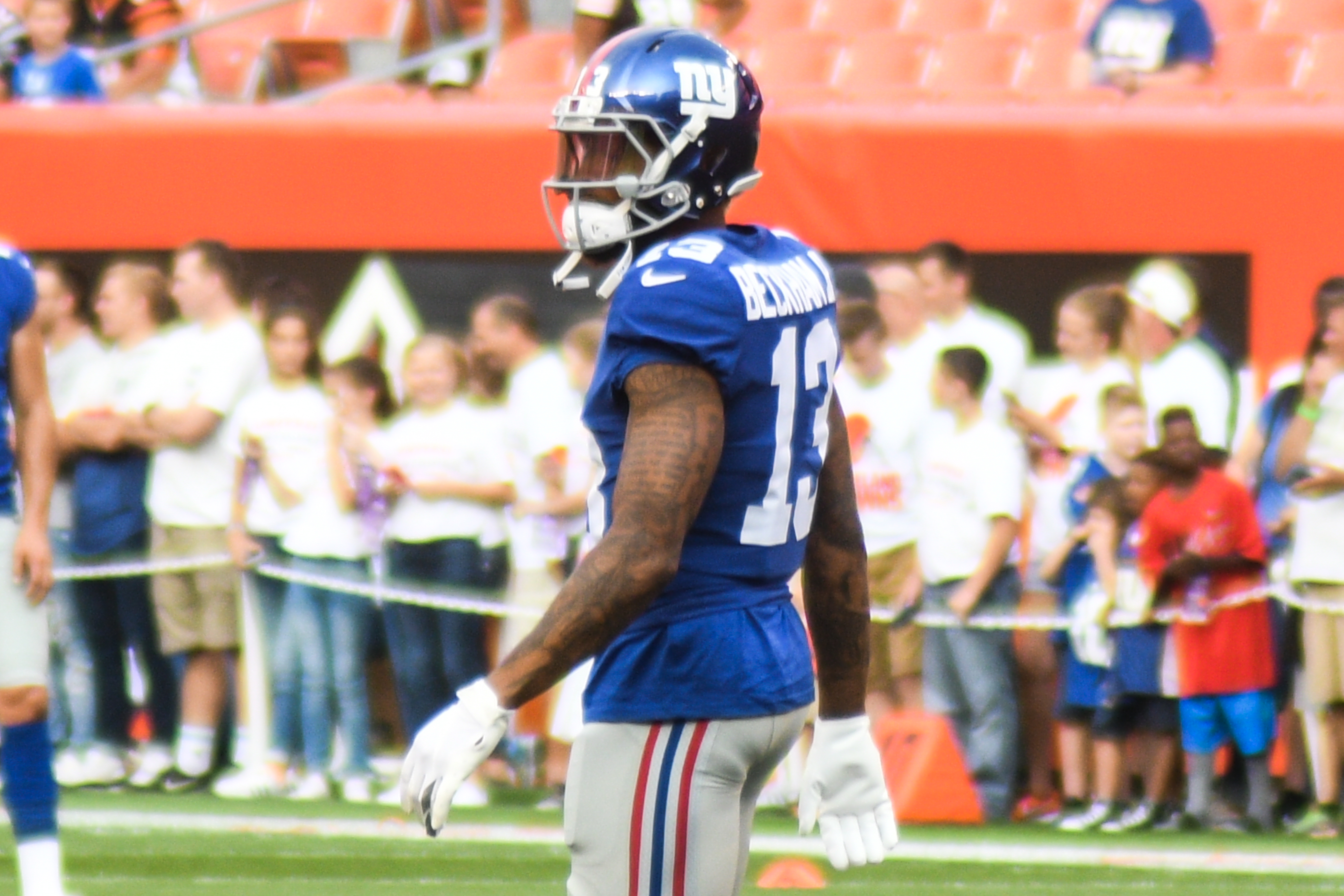 Odell Beckham Jr.